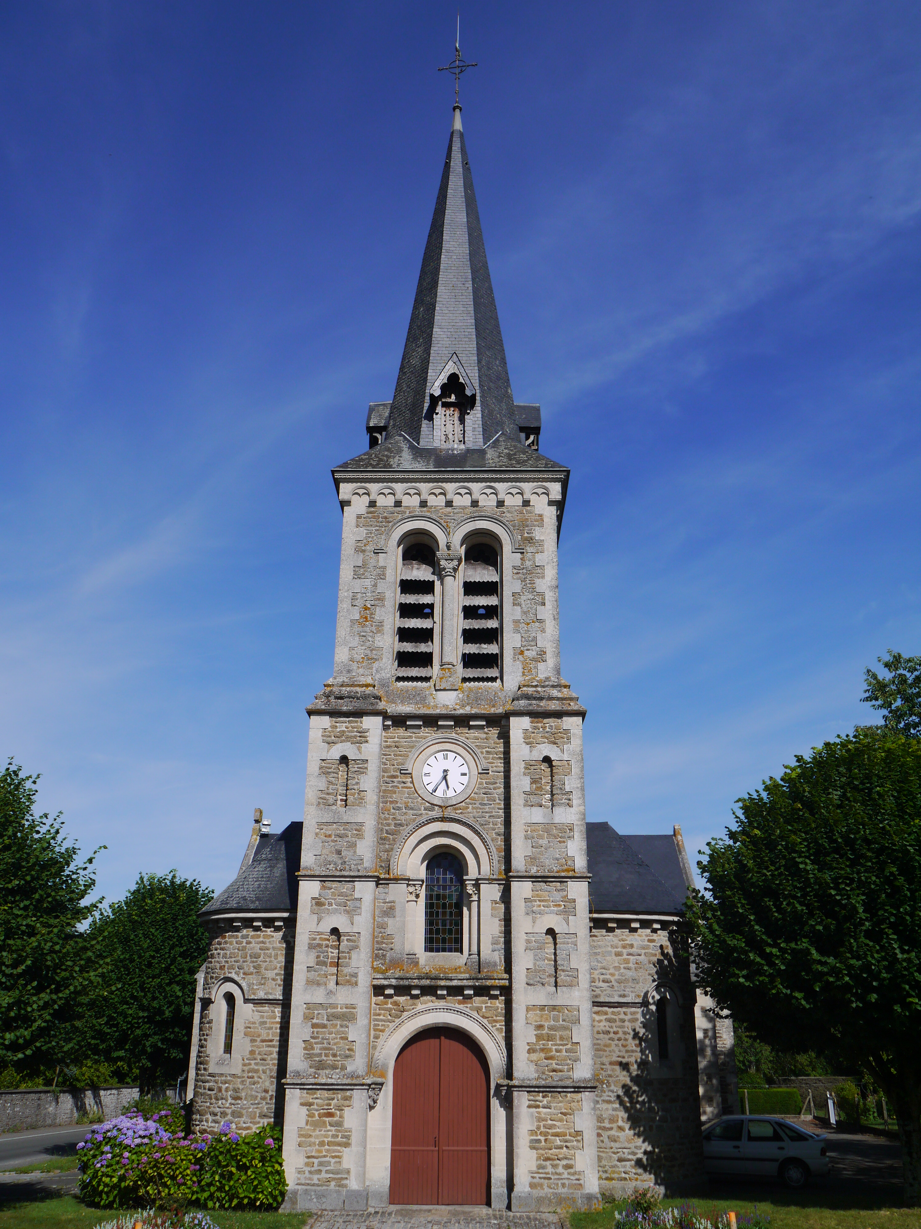 L'église Saint-Baudelle.